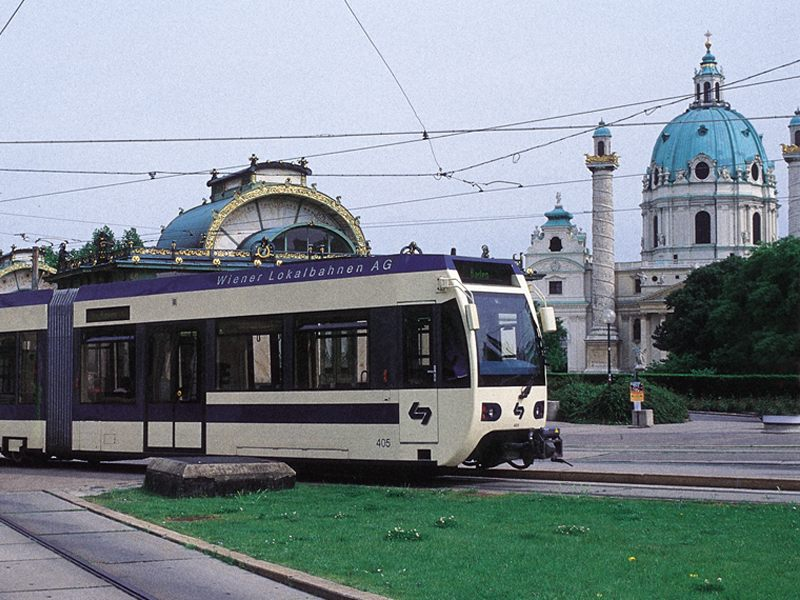 Ein Triebwagen Typ 400 der Lokalbahn Wien–Baden auf dem Karlsplatz in Wien.